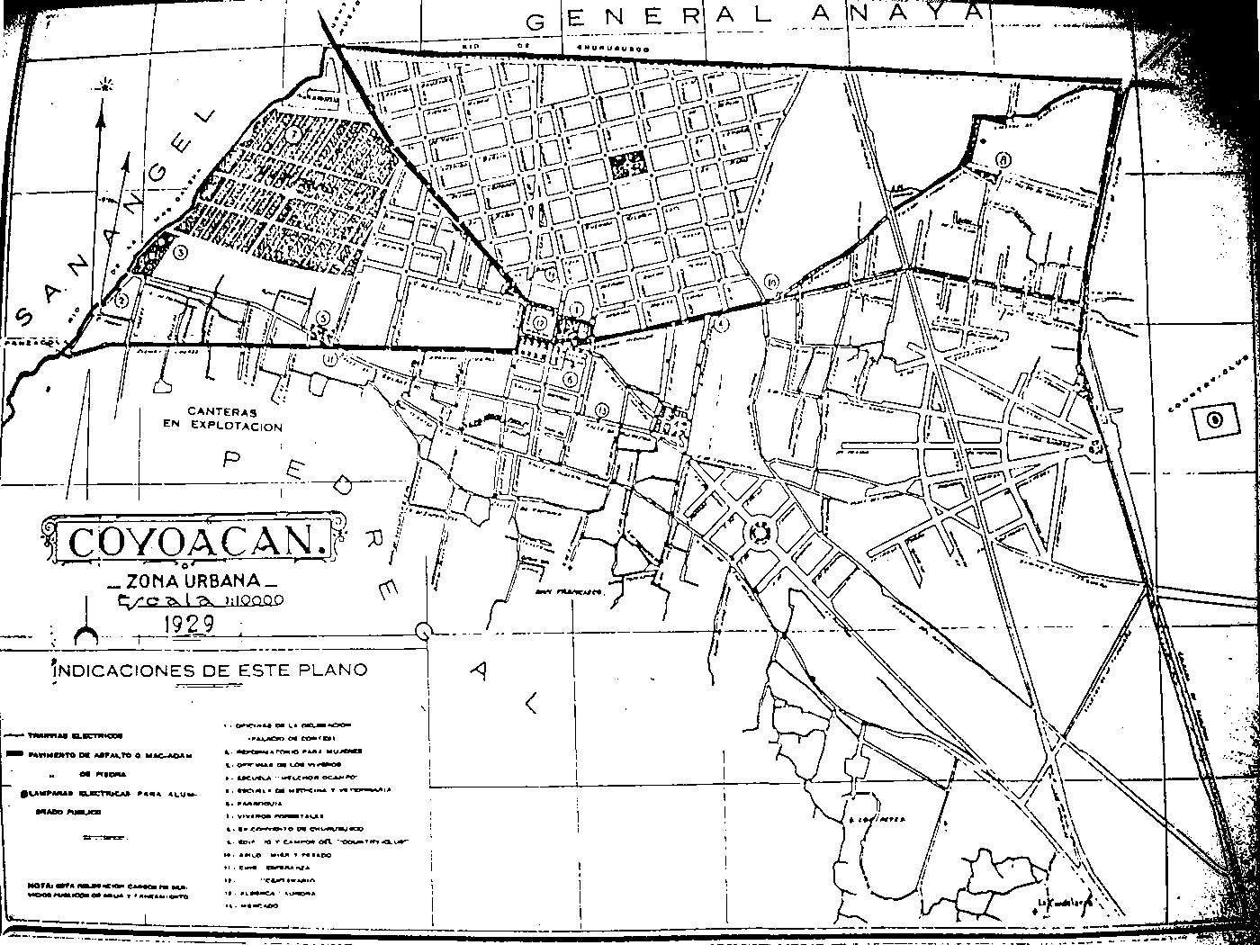 Zona urbana de Coyoacan en 1929 (Mexico)